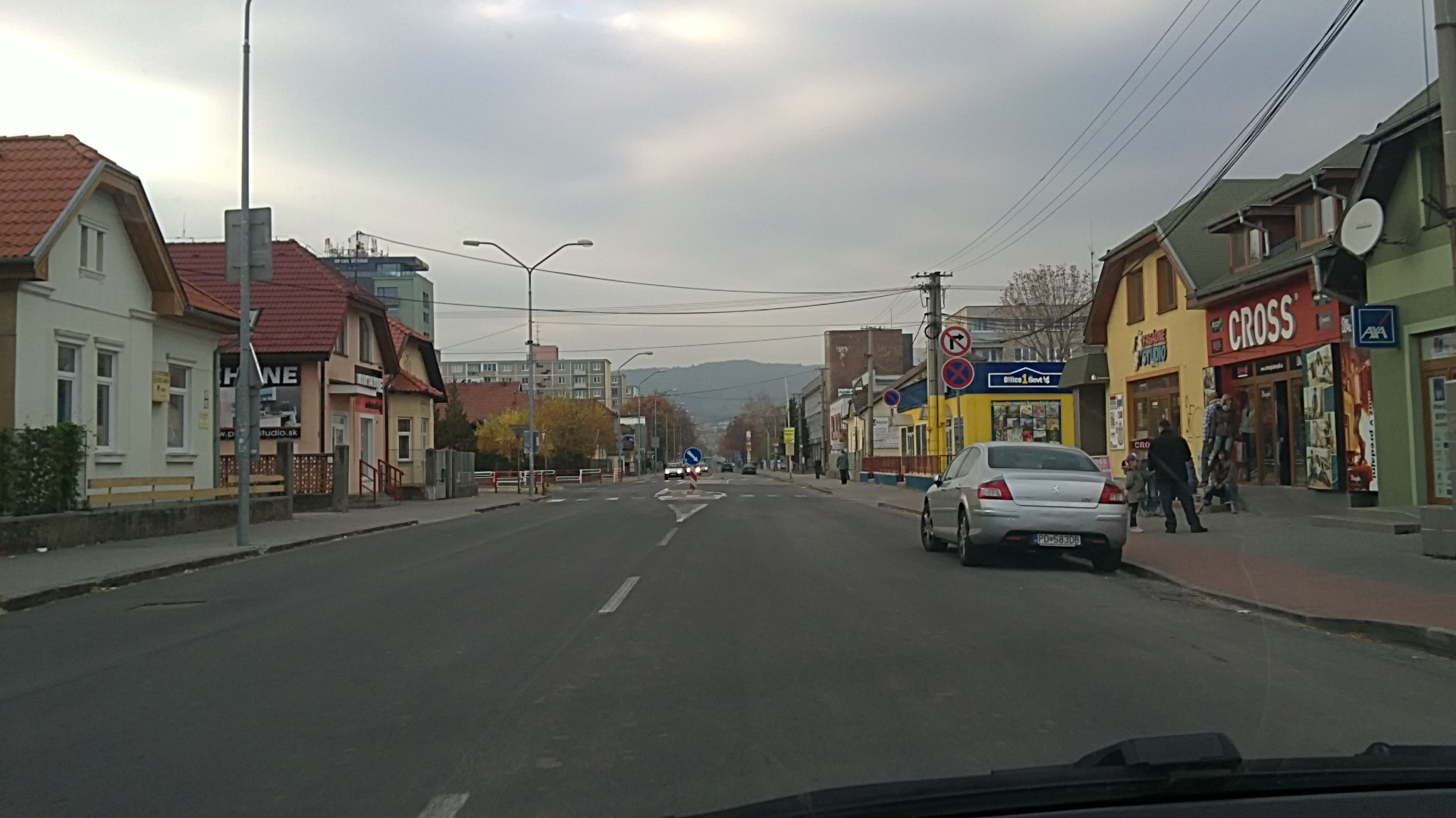 Bojnická cesta Prievidza